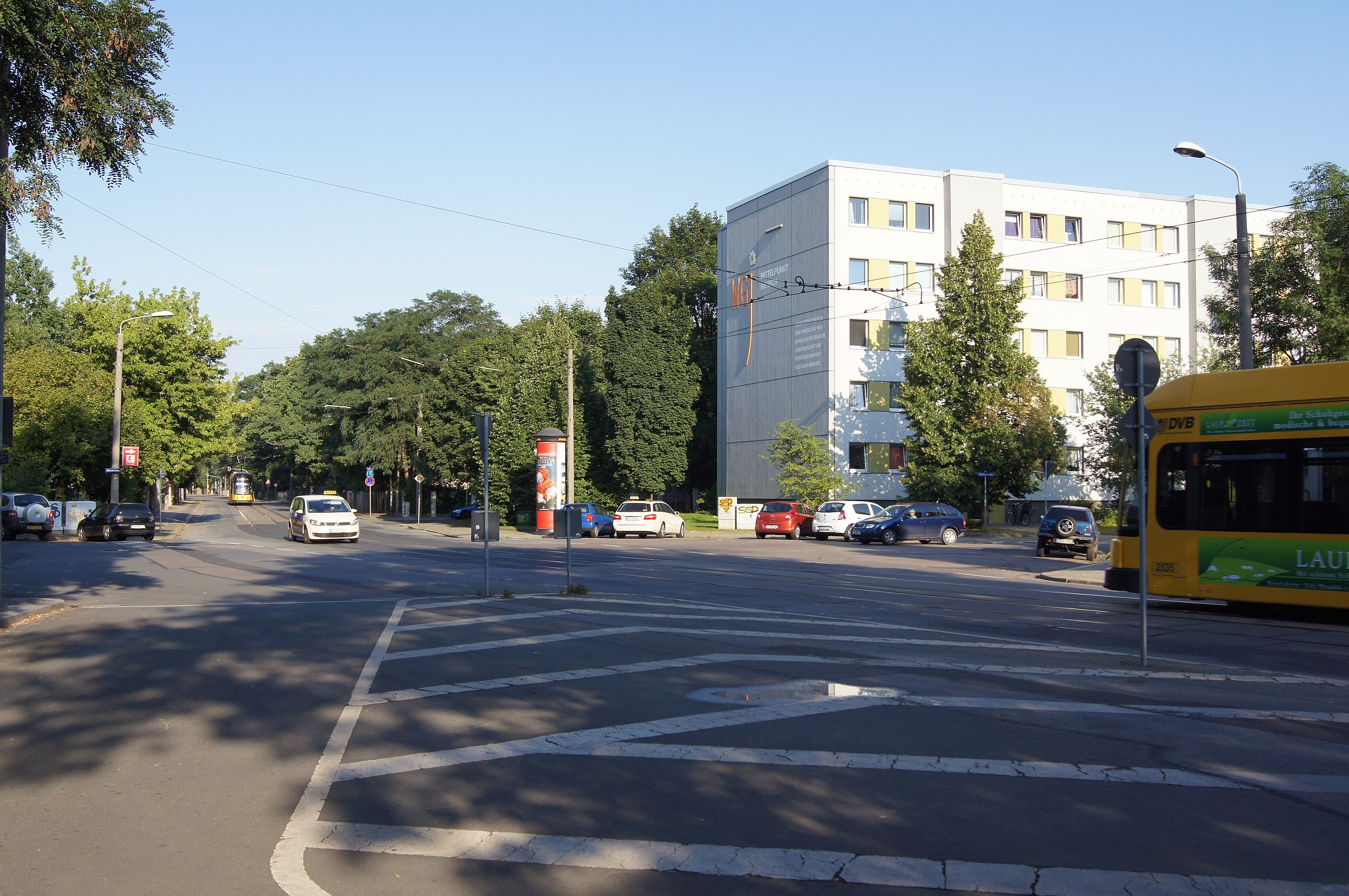 Ansicht des Platzes